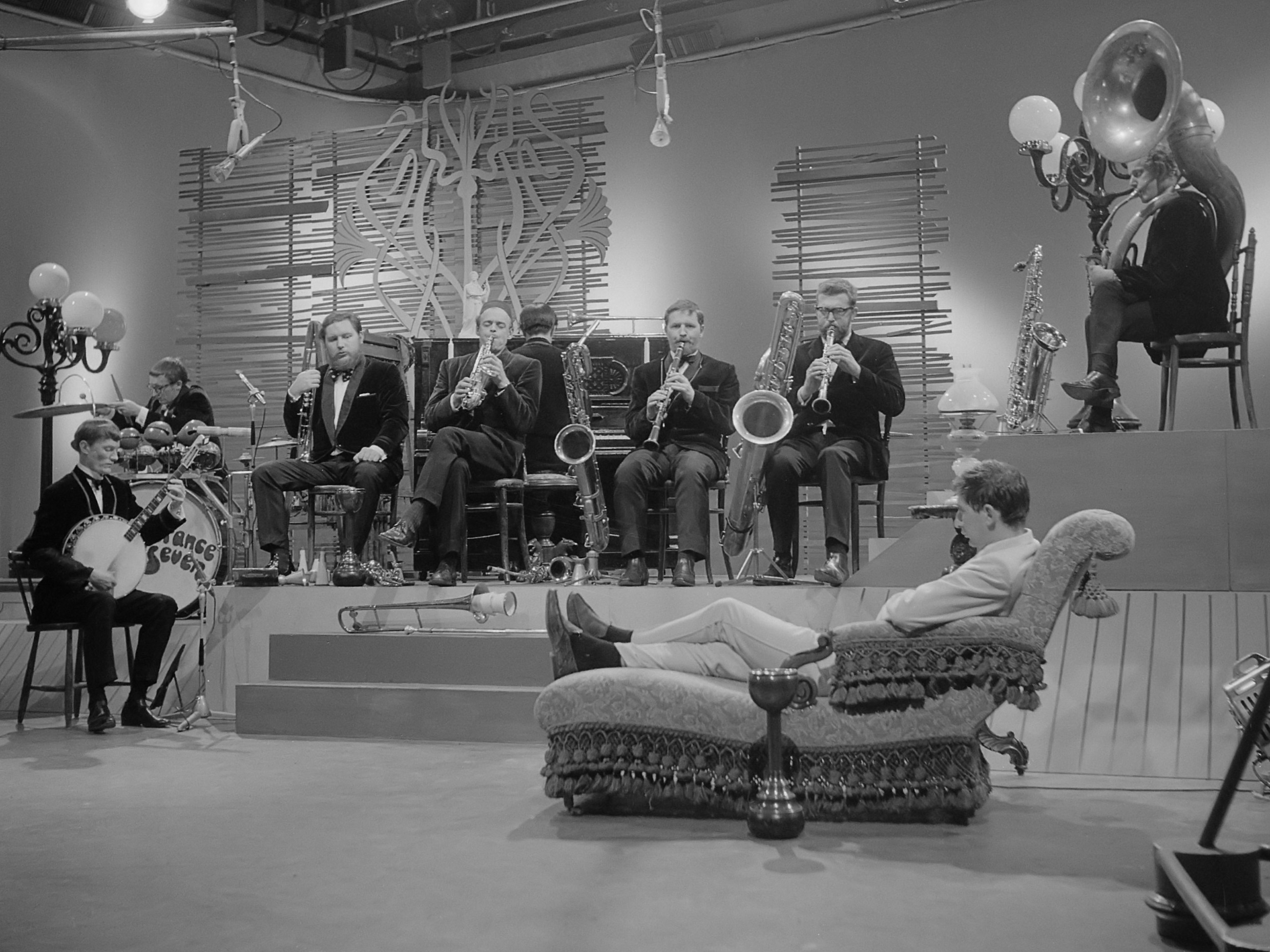 TV Meet the Band , the Temperance Seven 6 augustus 1962